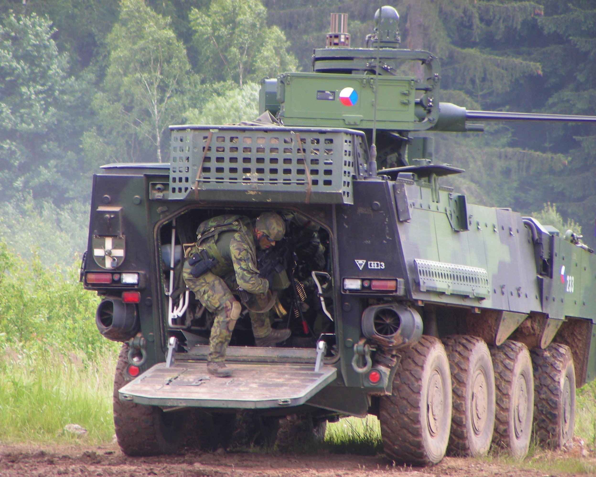 Kulometník s FN MINIMI opouští vozidlo Pandur II Armády České republiky; BAHNA 2018.